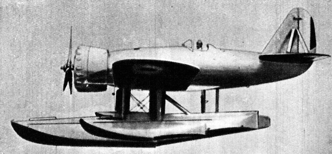 Francuski wodnosamolot myśliwski Loire 210.